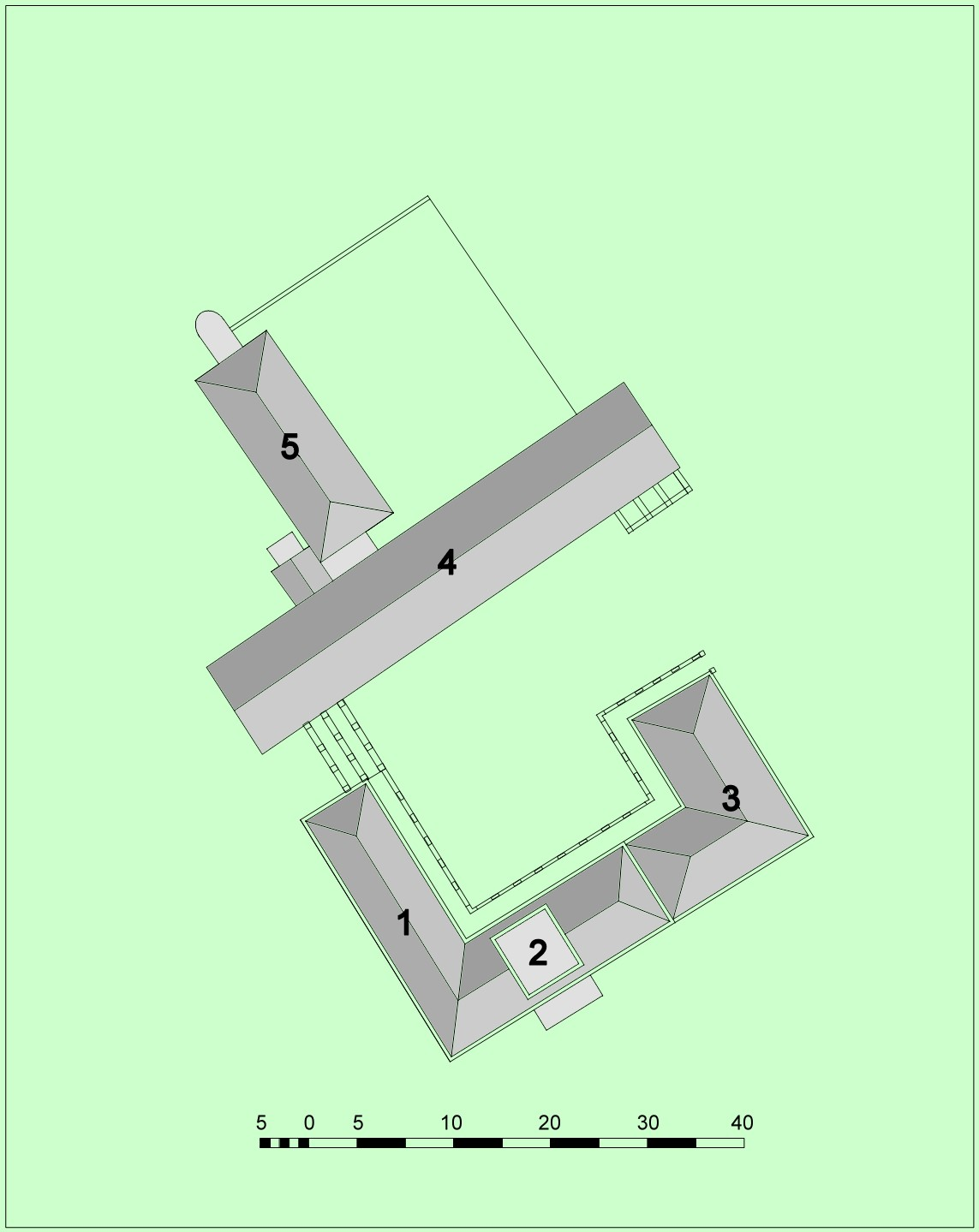 Berlin - Schloss Glienicke, Situationsplan Umbau Fürst Hardenberg